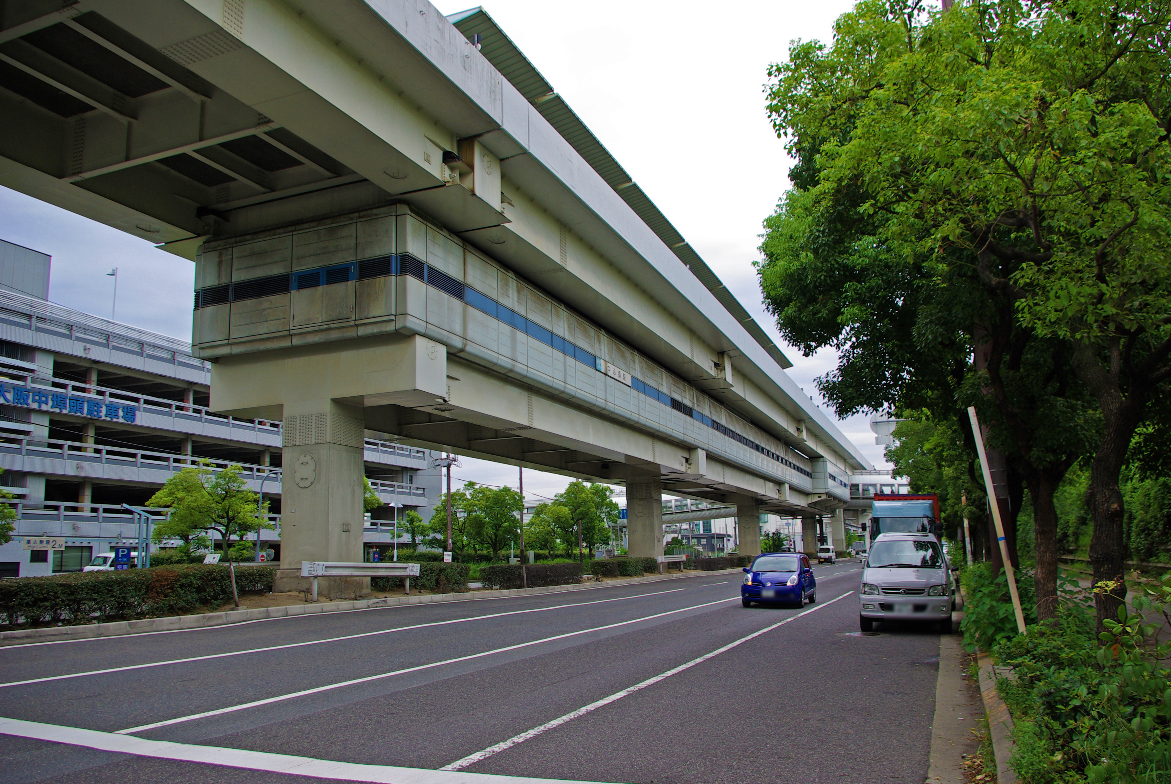 大阪市交通局南港ポートタウン線中ふ頭駅